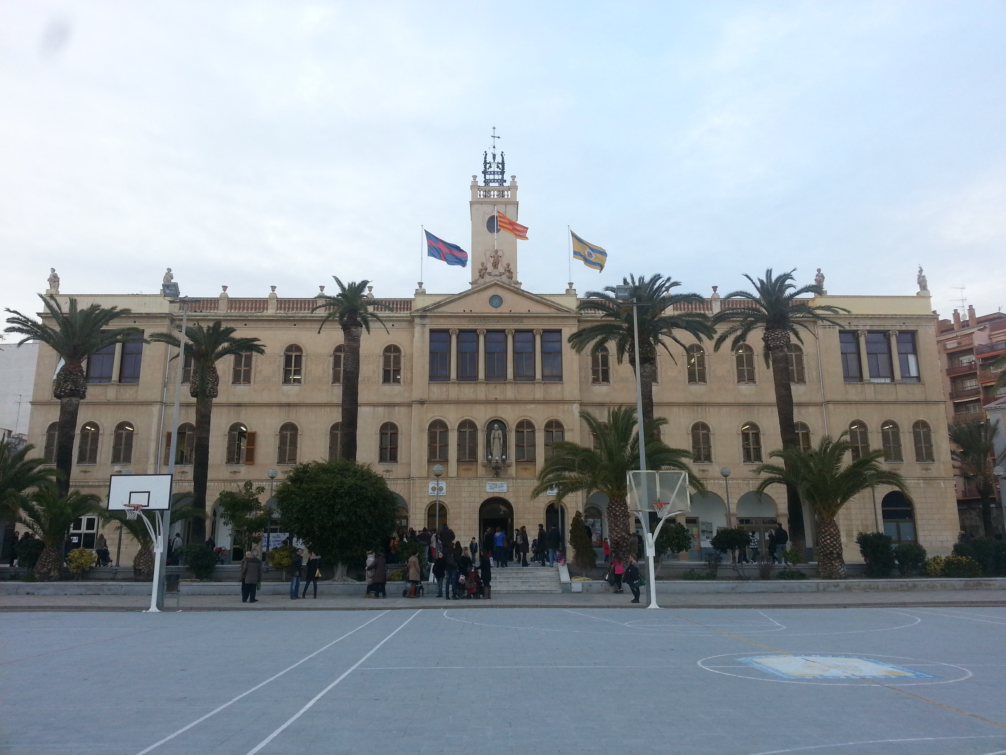 Façana de l'edifici principal de l'escola Maristes Valldemia de Mataró (Catalunya)